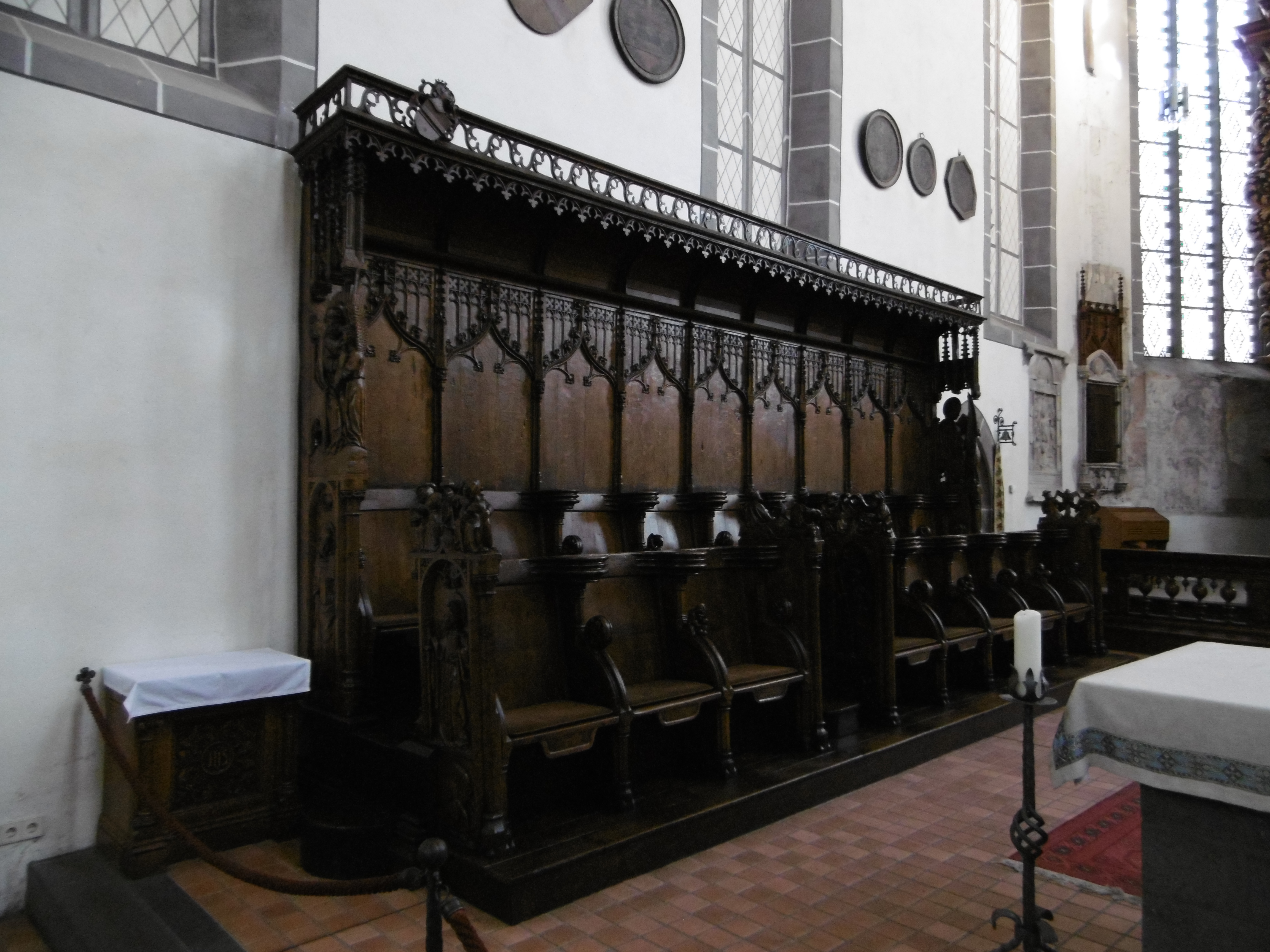 Chorgestühl in der Karmeliterkirche von Boppard